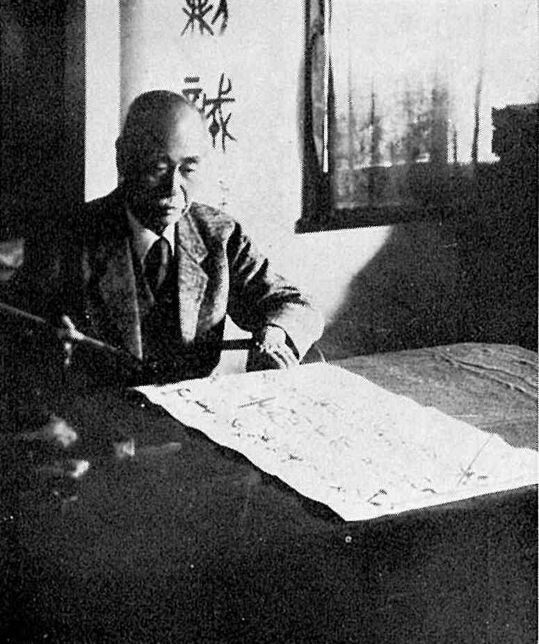 昭和22年11月 喜寿を迎えた針塚長太郎